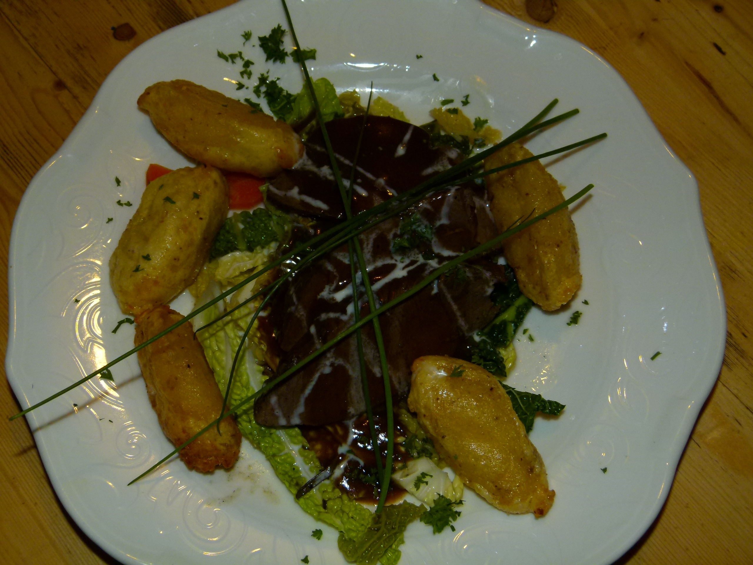 Hirschkeule mit Gemüse und Haselnusskrapfen, Restaurant Tarsius in Heidenau, Sachsen